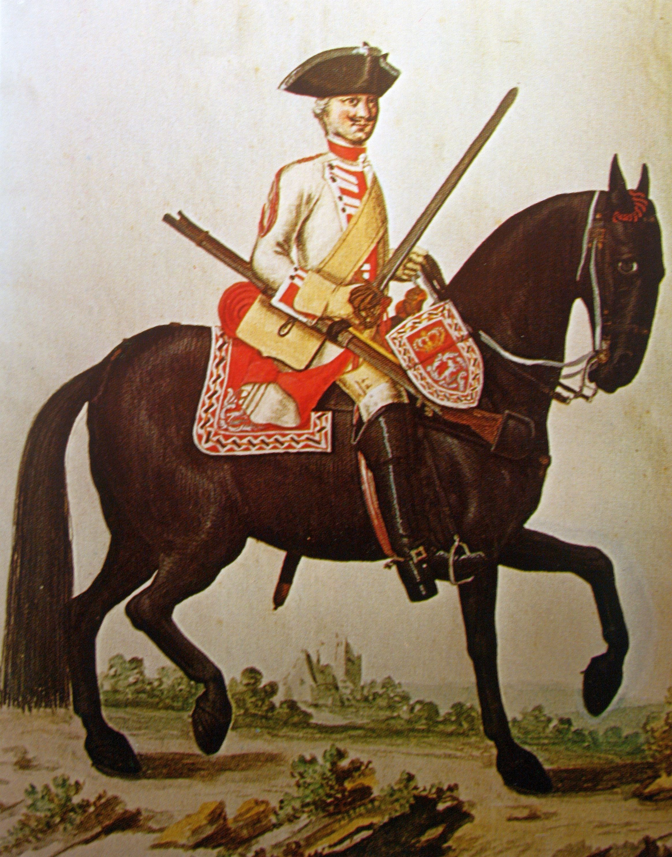 Kurhannoversches_Dragonerregiment_D_I - Dragoner